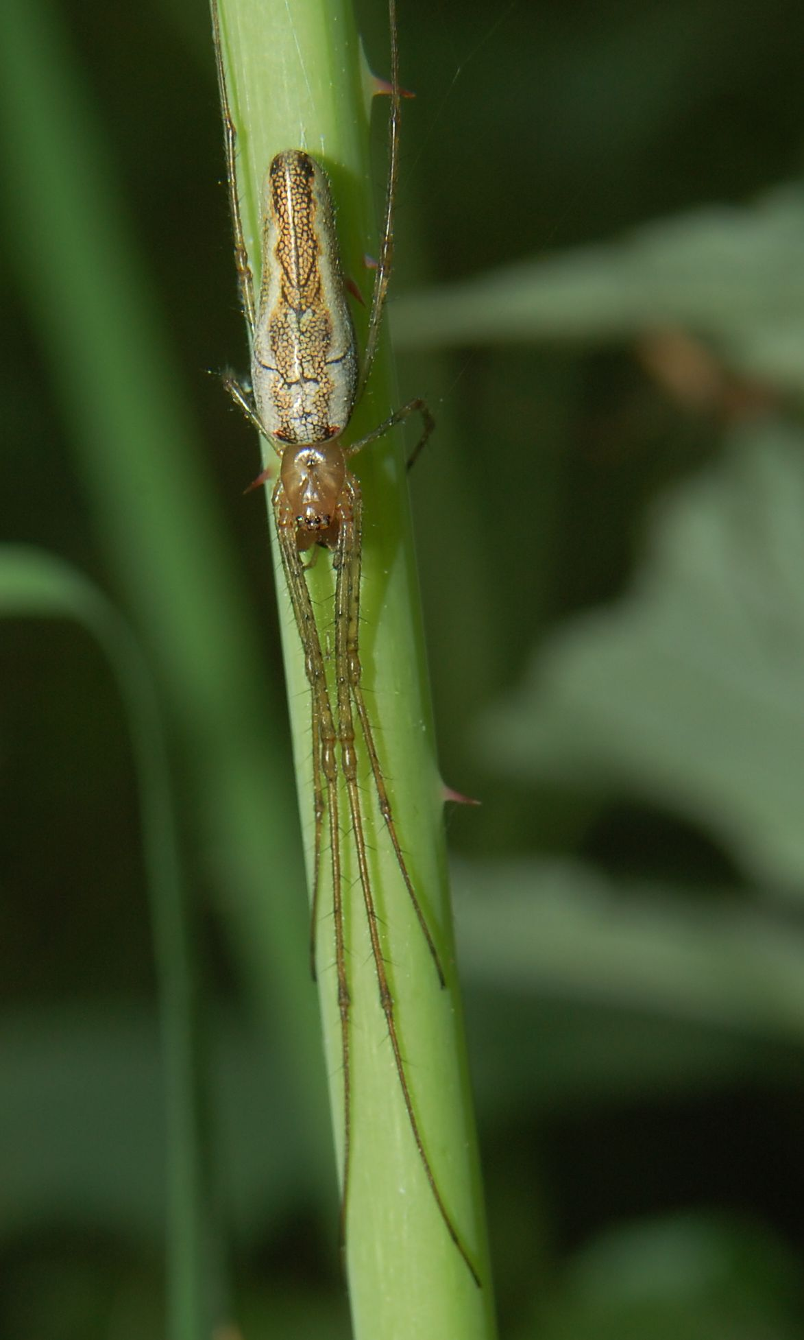 Tetragnatha montana, female. Spandau, Berlin, Deutschland, det. (genitalmorphologisch) K.-H. Kielhorn, Berlin